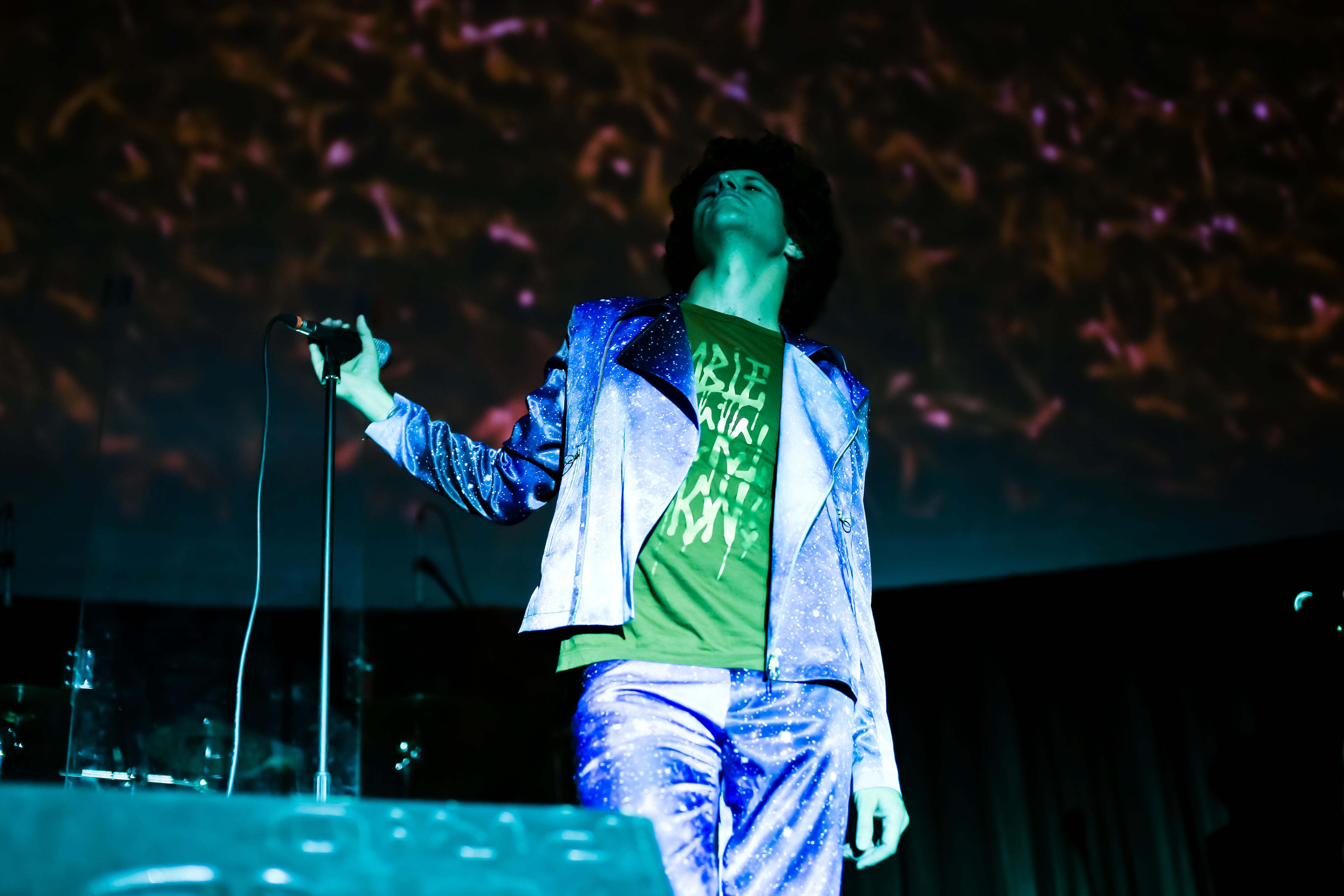 Закрытый концерт в киевском Планетарии. Сентябрь 2013.